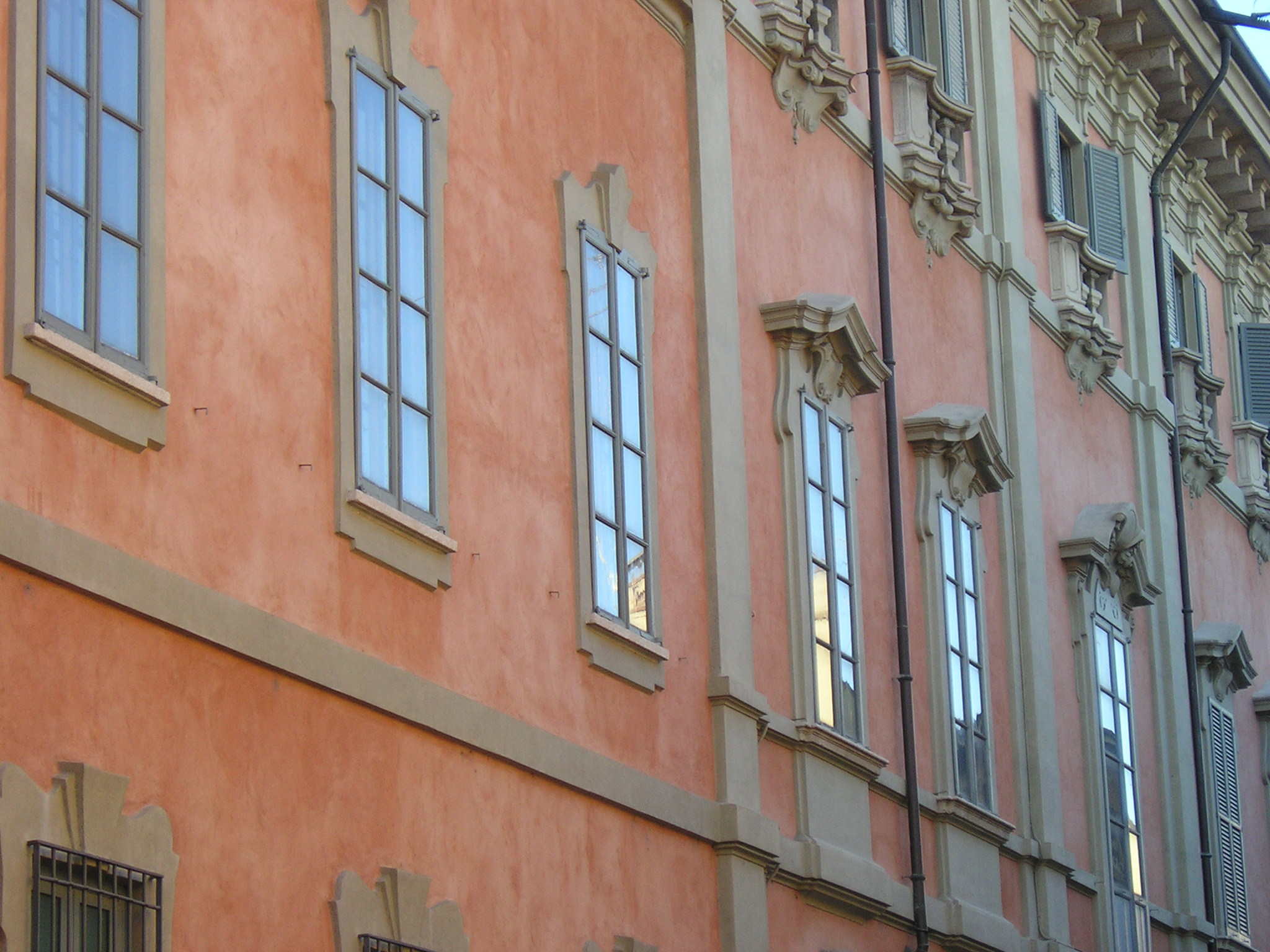 Facciata del palazzo Modignani-Pitoletti a Lodi